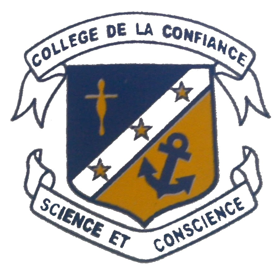 Les couleurs du collège